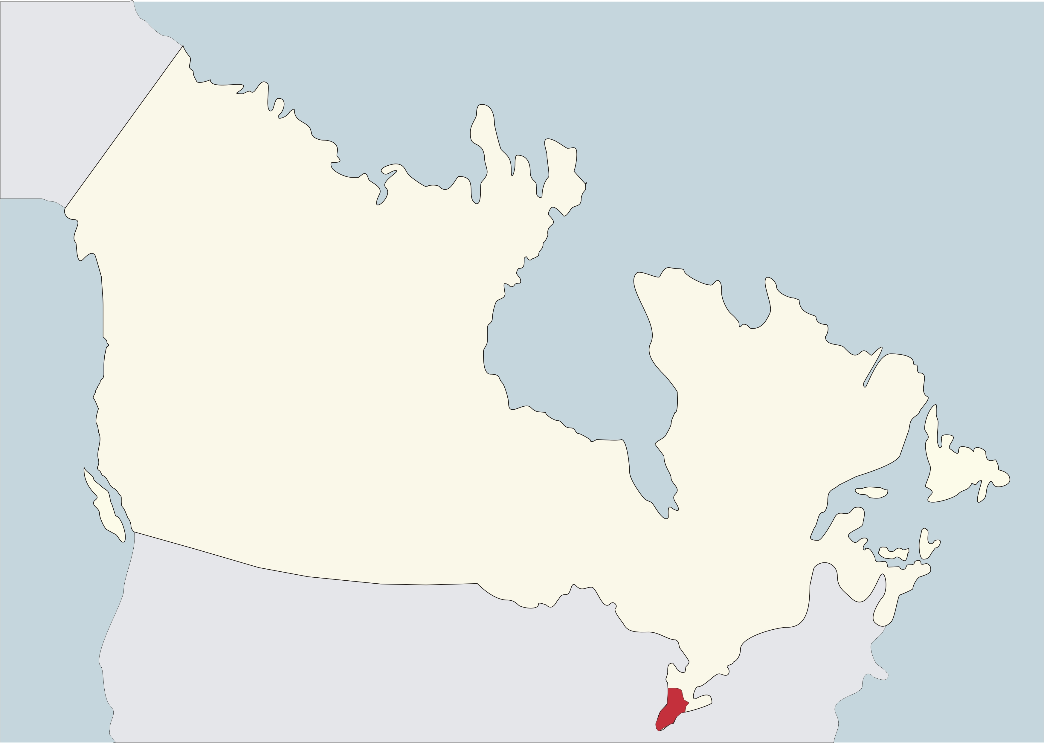 Mapa del bisbat de London a Canadà